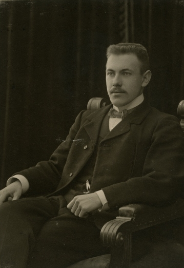 Bernhard Linde, eesti publitsist ja tõlkija